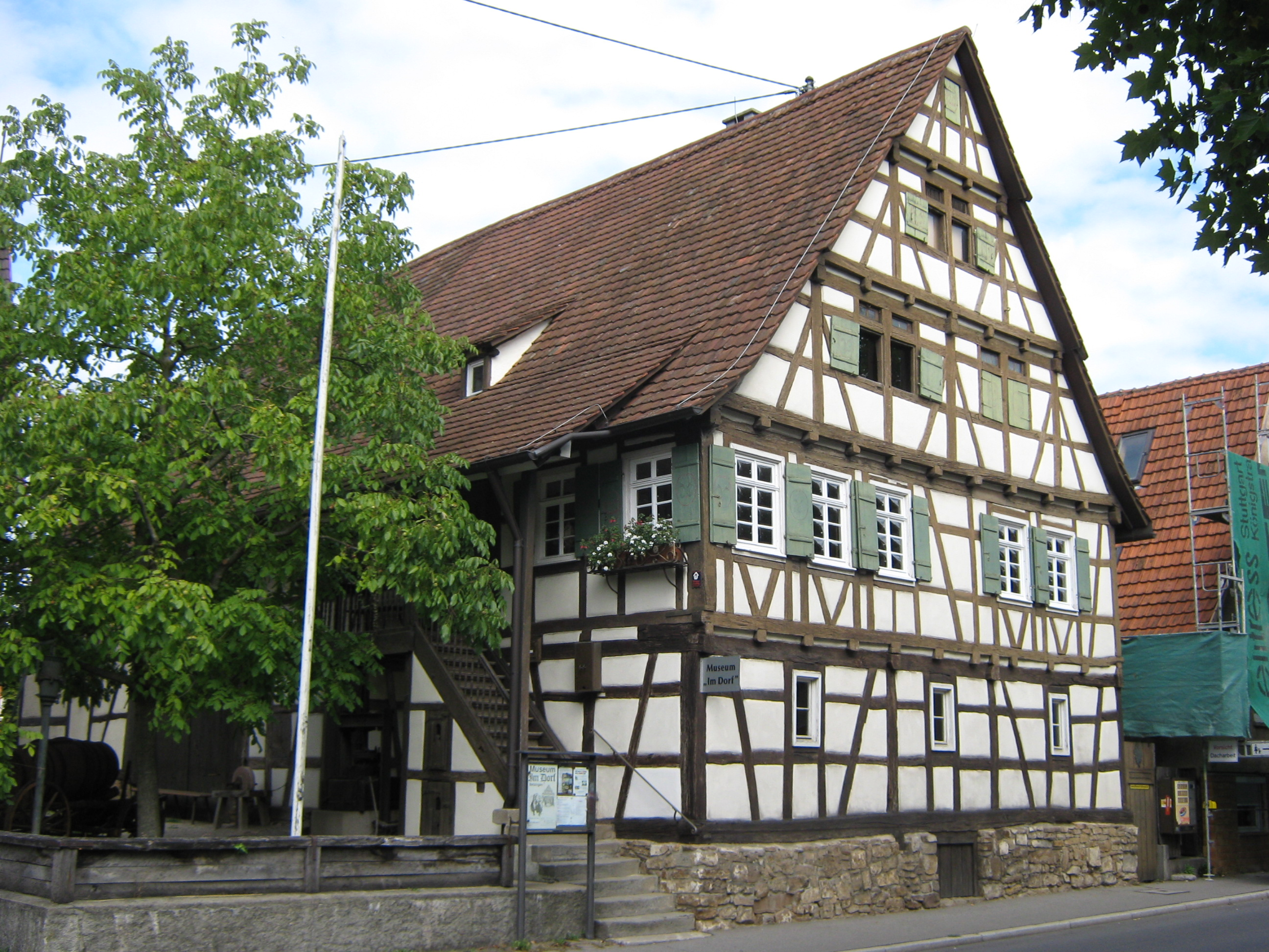 Das Gebäude in Betzingen Im Dorf 16 wurde im 17. Jahrhundert erbaut und wird inzwischen als Heimatmuseum genutzt.